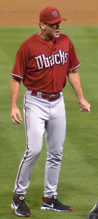 Bob Melvin